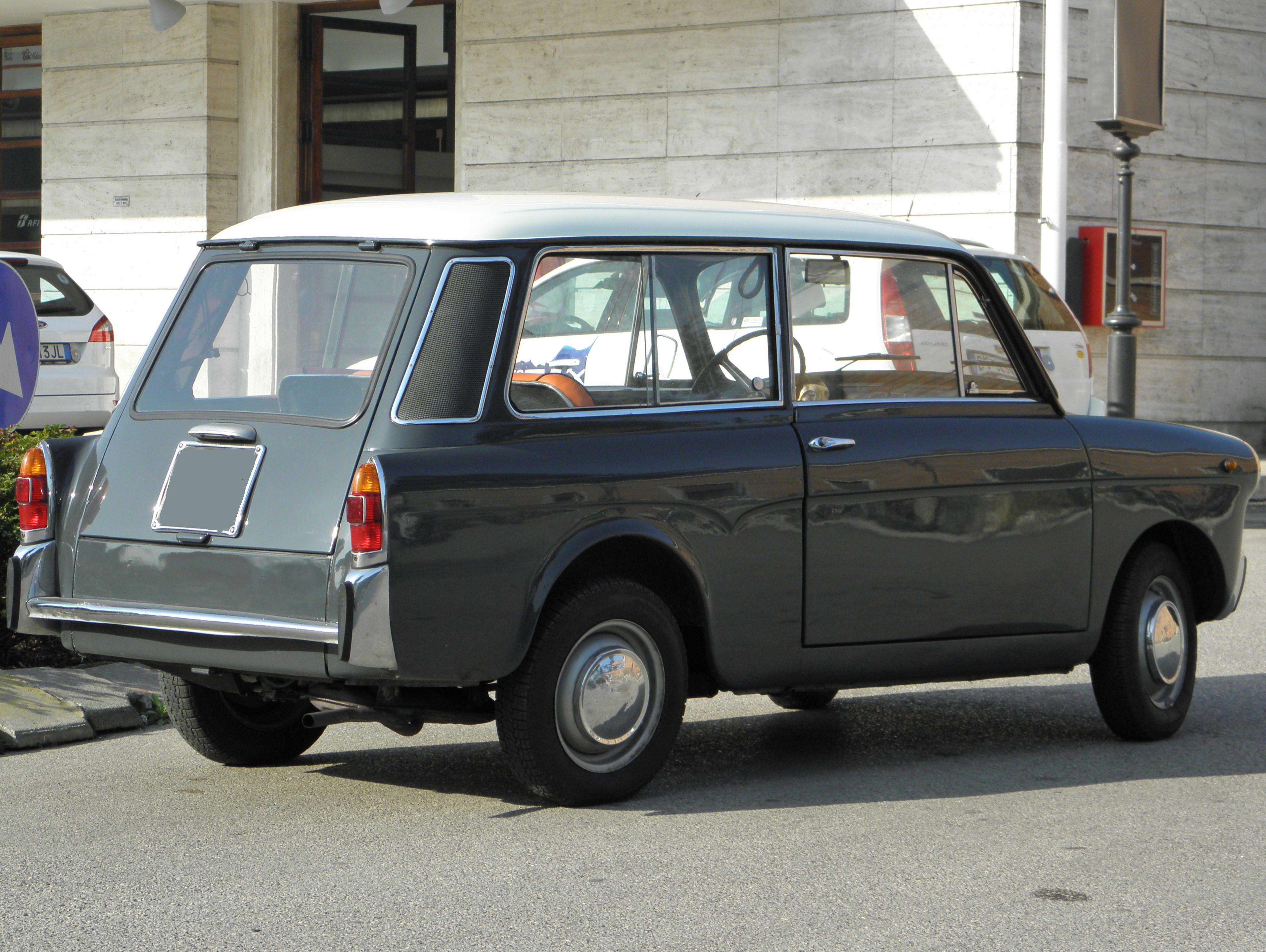 Autobianchi Bianchina Panoramica fotografata in sosta nei pressi della stazione ferroviaria di Rovigo.